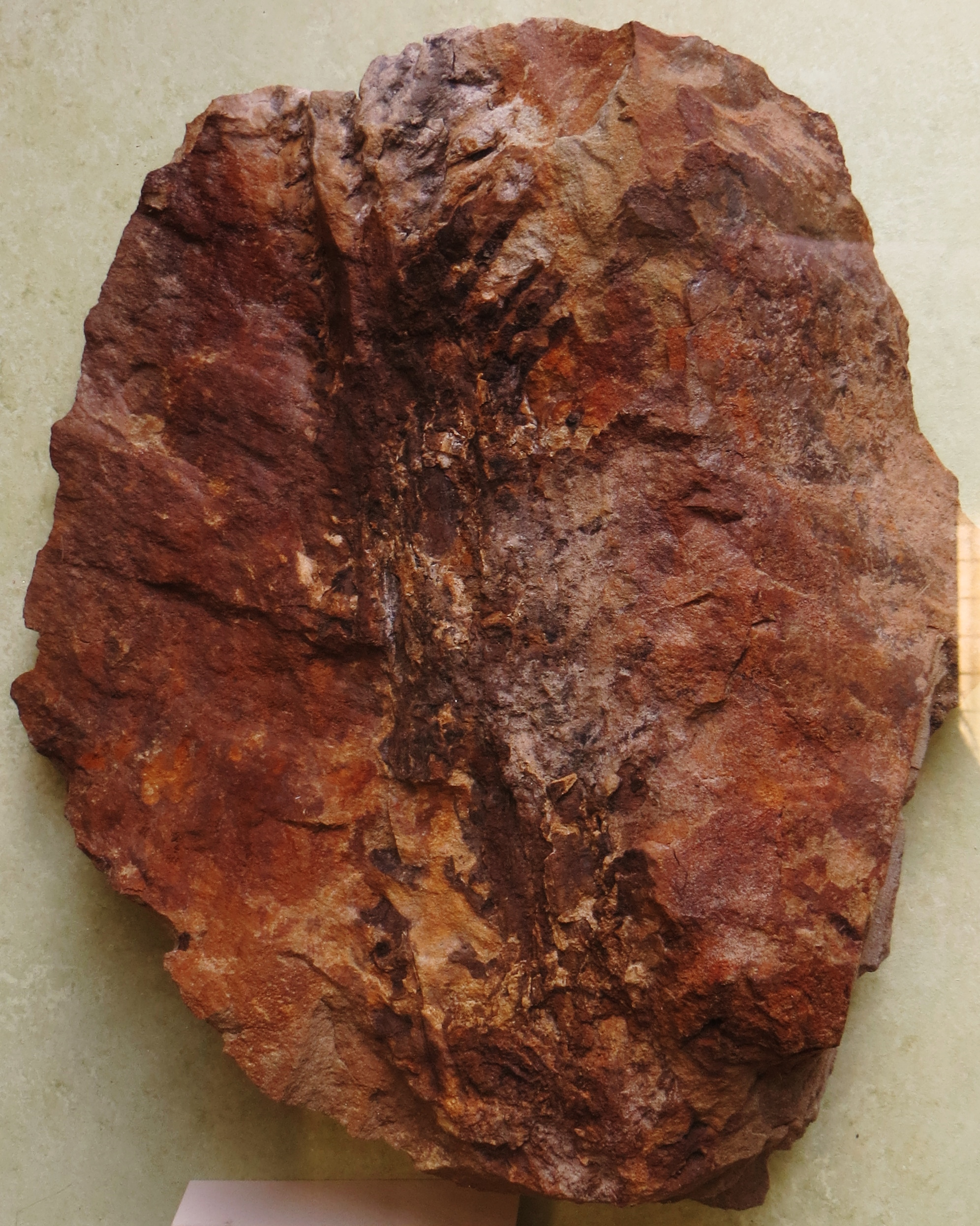 Fossil of plant - Took the picture at Natural History Museum, Bonn University